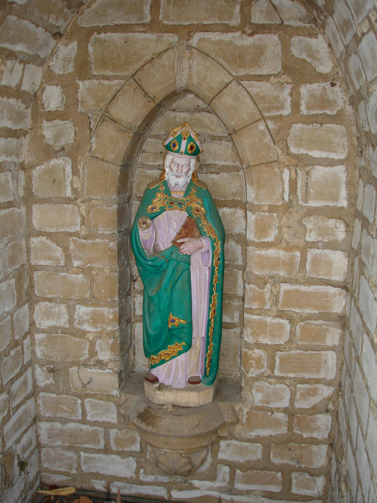 Statue de saint Pry à Saint-Prix (Val-d'Oise), France